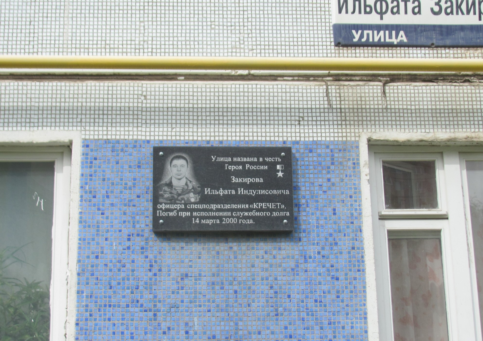 Памятная доска на доме 18 на улице И.Закирова в городе Ижевск